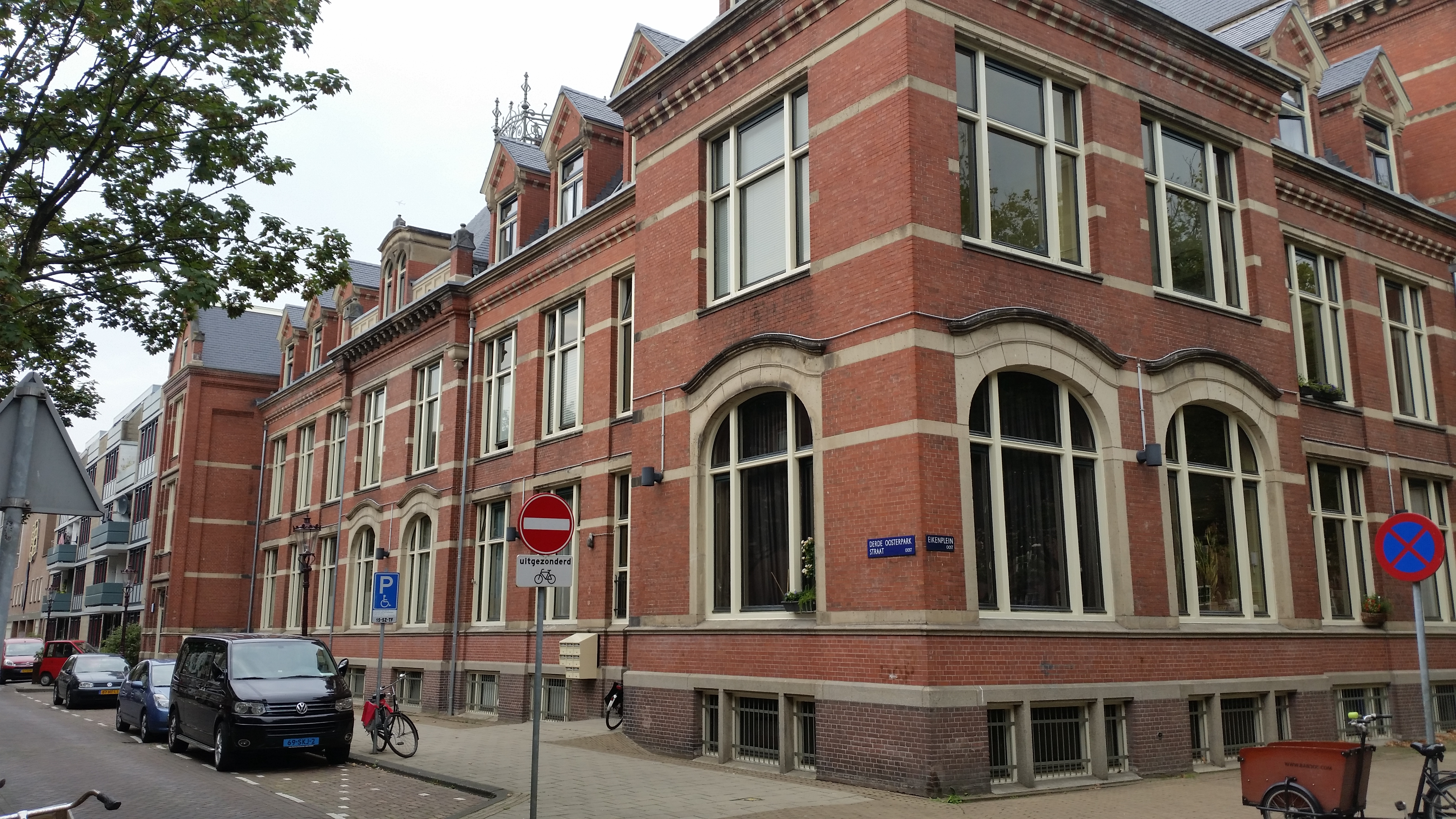 Elisabeth Otter-Knol Stichting aan het Eikenplein.